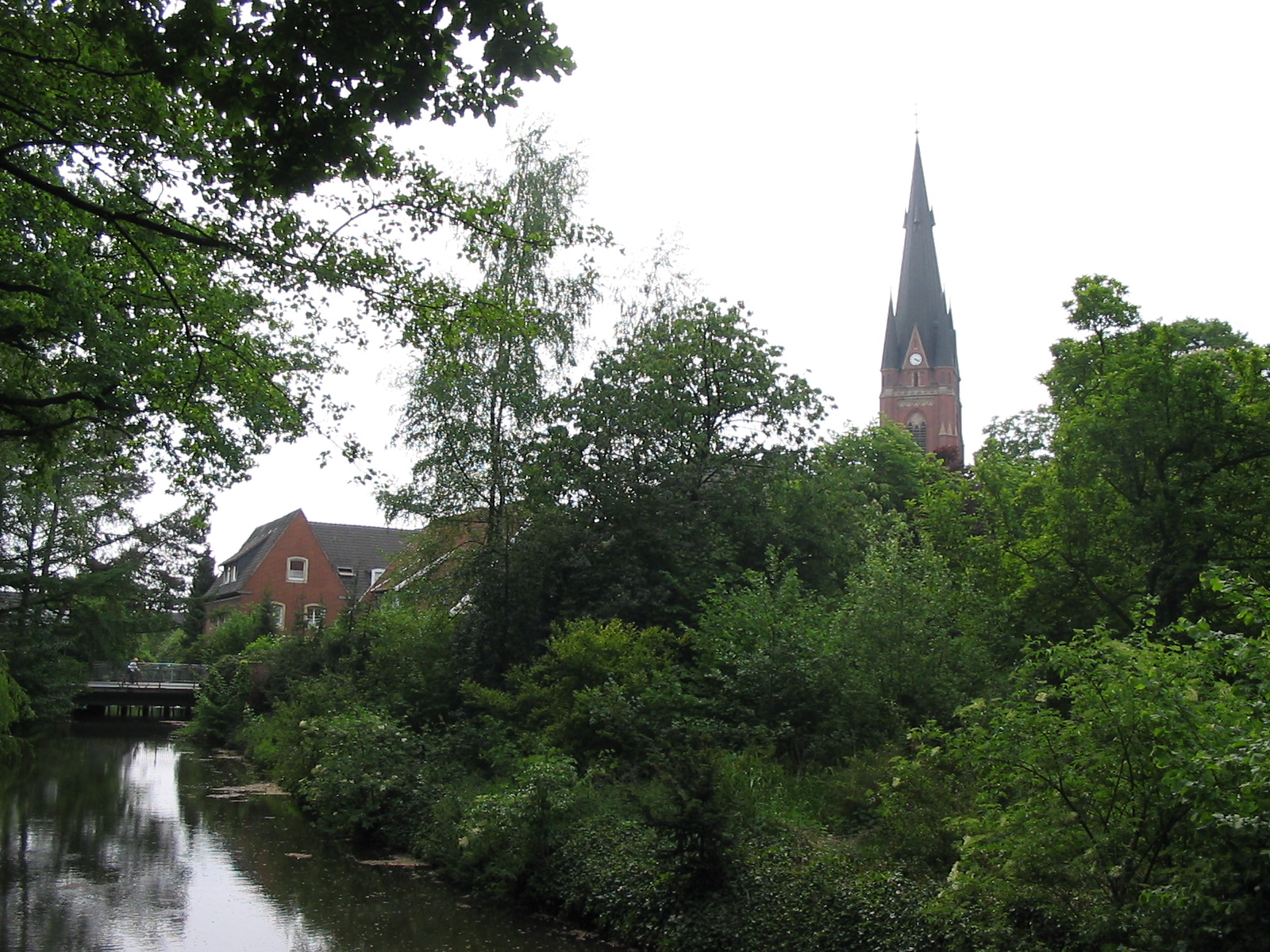 Rheder Bach with Gudula church